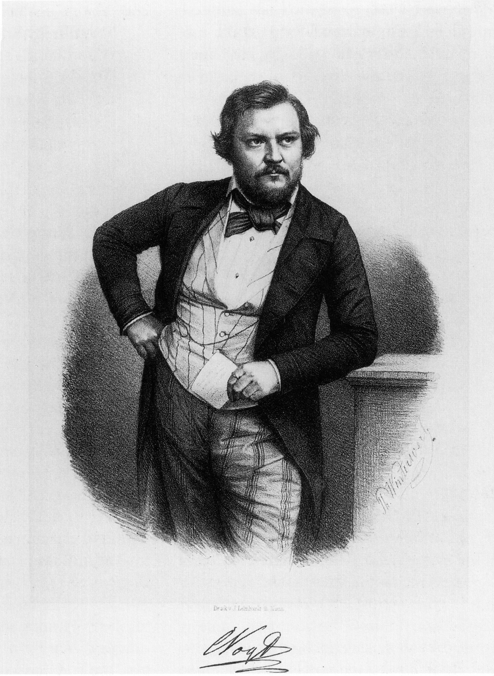 Lithographie, Philipp Winterwerb, 1848. Carl Vogt, Abgeordneter der Frankfurter Nationalversammlung